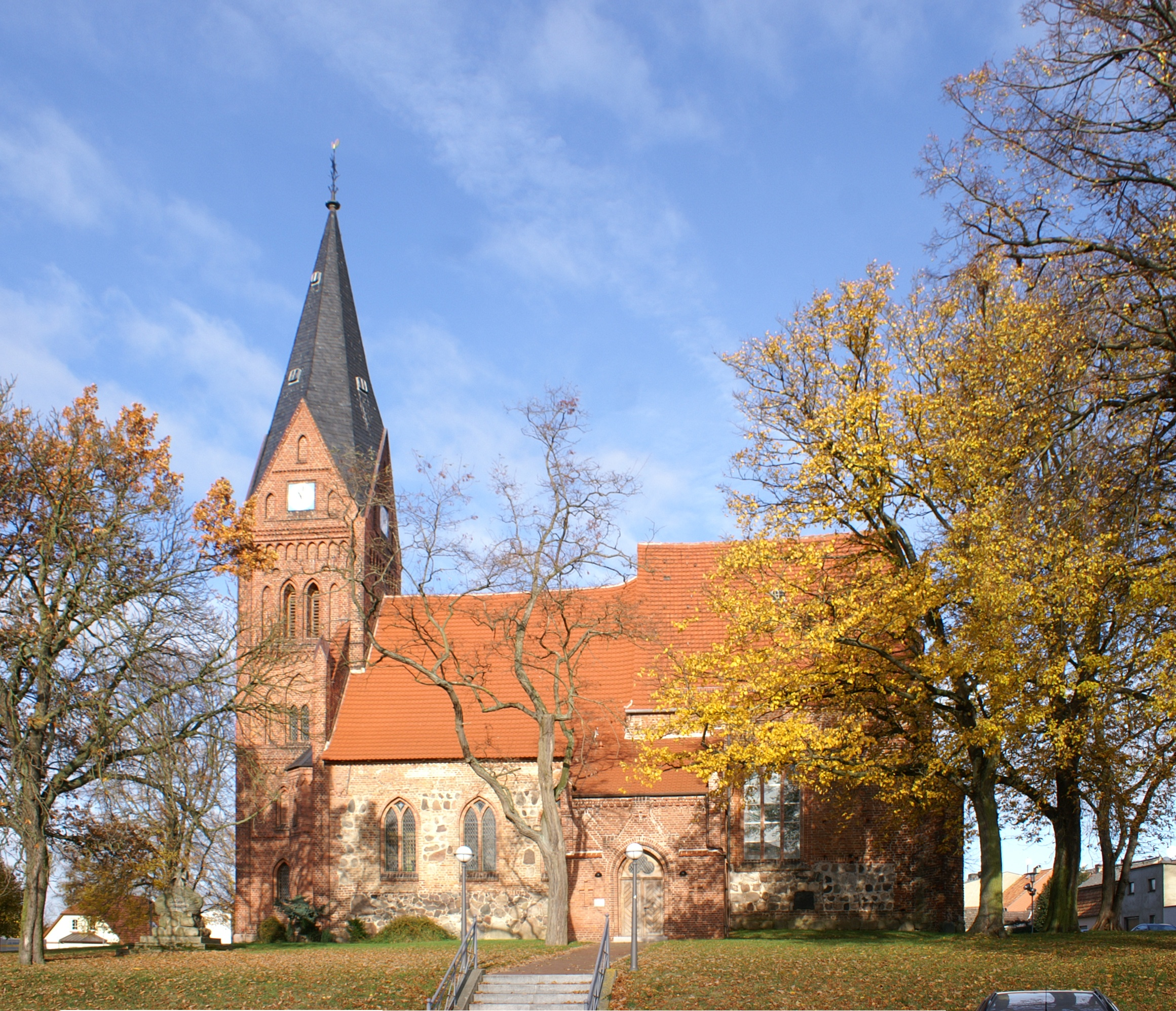 Ribnitz-Damgarten - St.Bartholomäus in Damgarten - Südseite (Landkreis Nordvorpommern, Mecklenburg-Vorpommern)